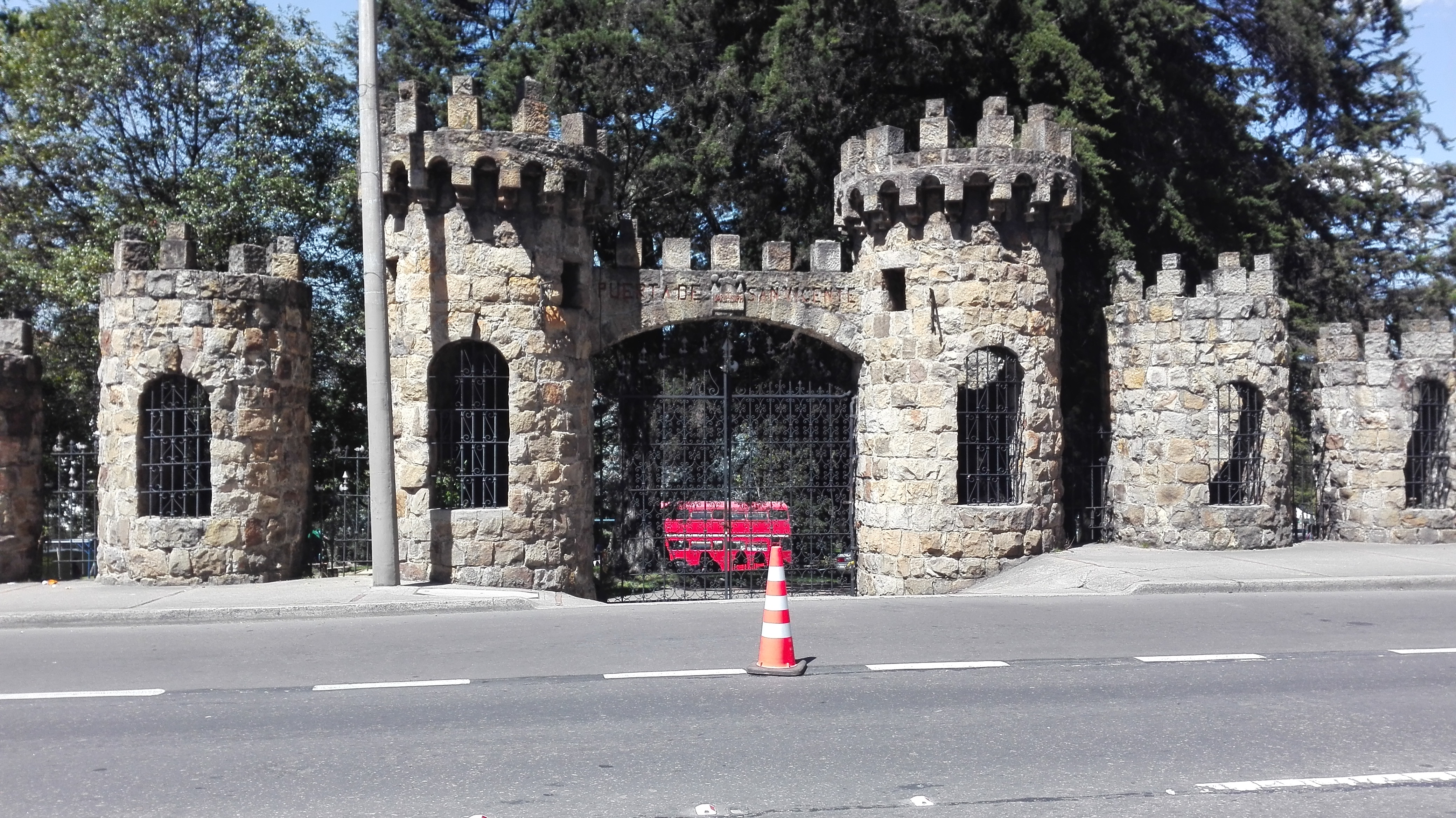 Puerta de San Vicente del Museo del Chicó sobre la Carrera Séptima con calle 92.